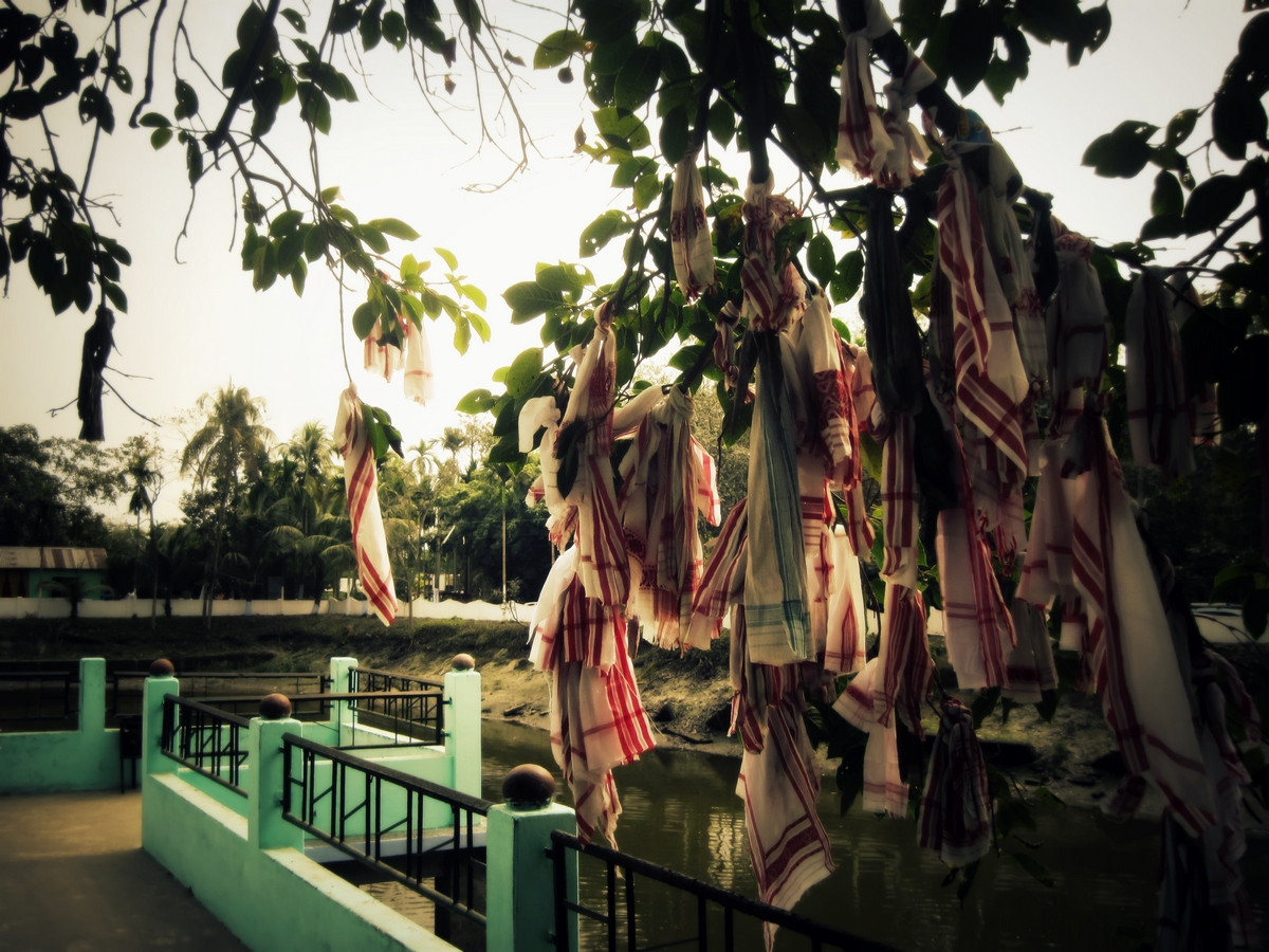 Assamese Gamosa Hanging on Tree.